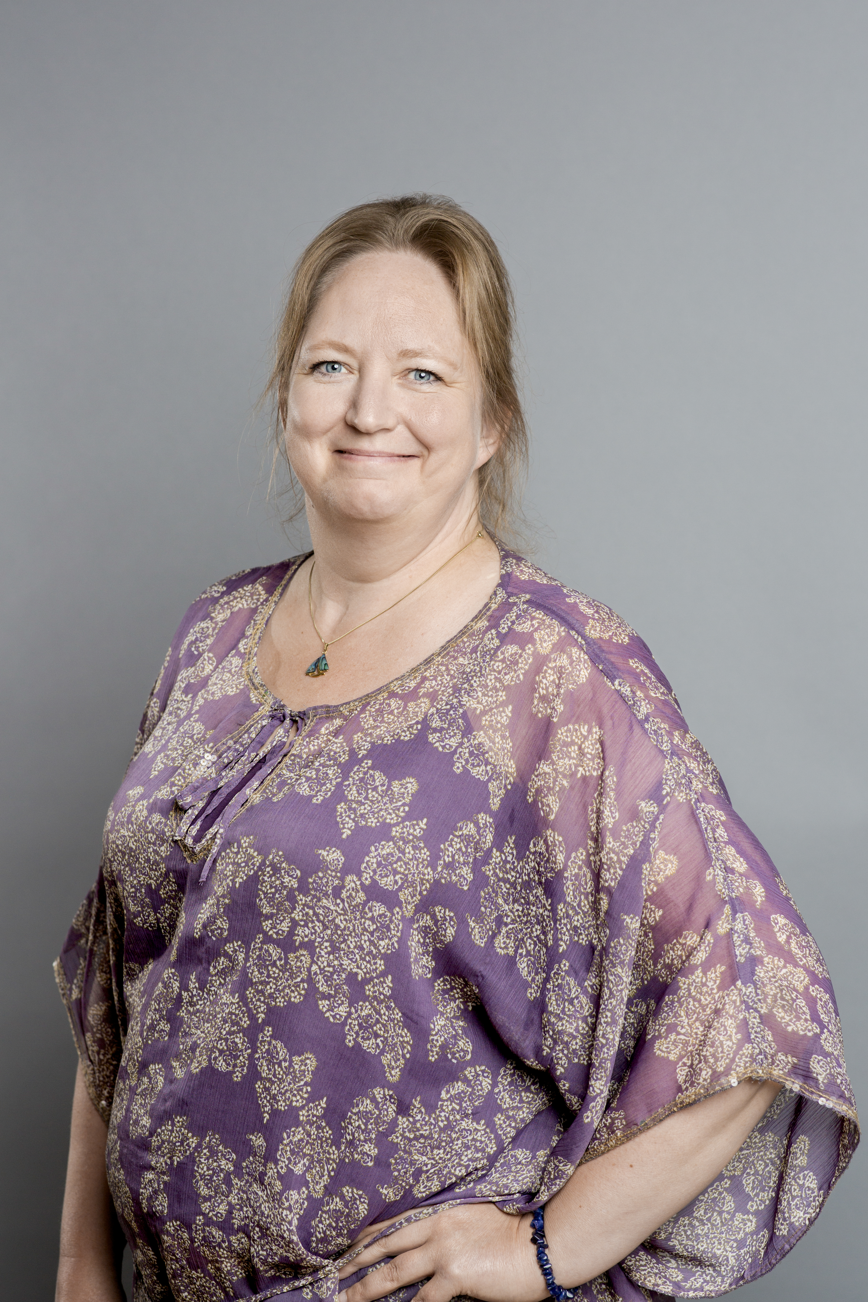 Jessica Thunander. Vänsterpartiet. 2018.